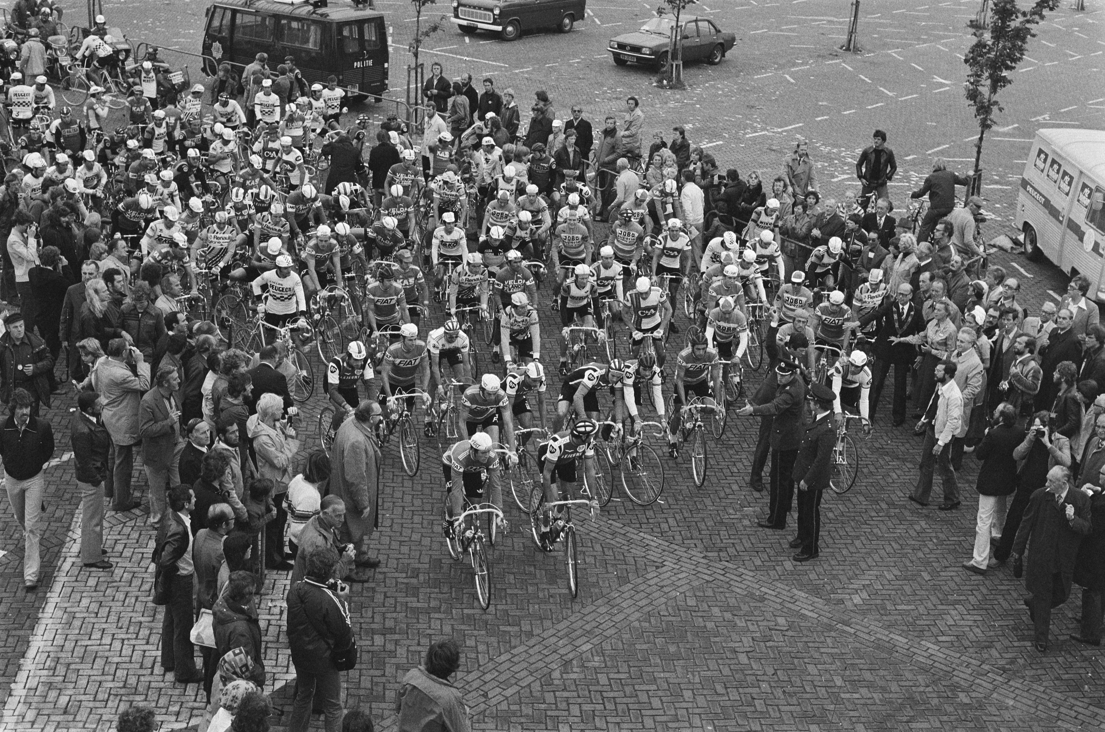 Tour de France 1e gedeelte, 1e etappe, Leiden St. Willibrord , overzicht start.